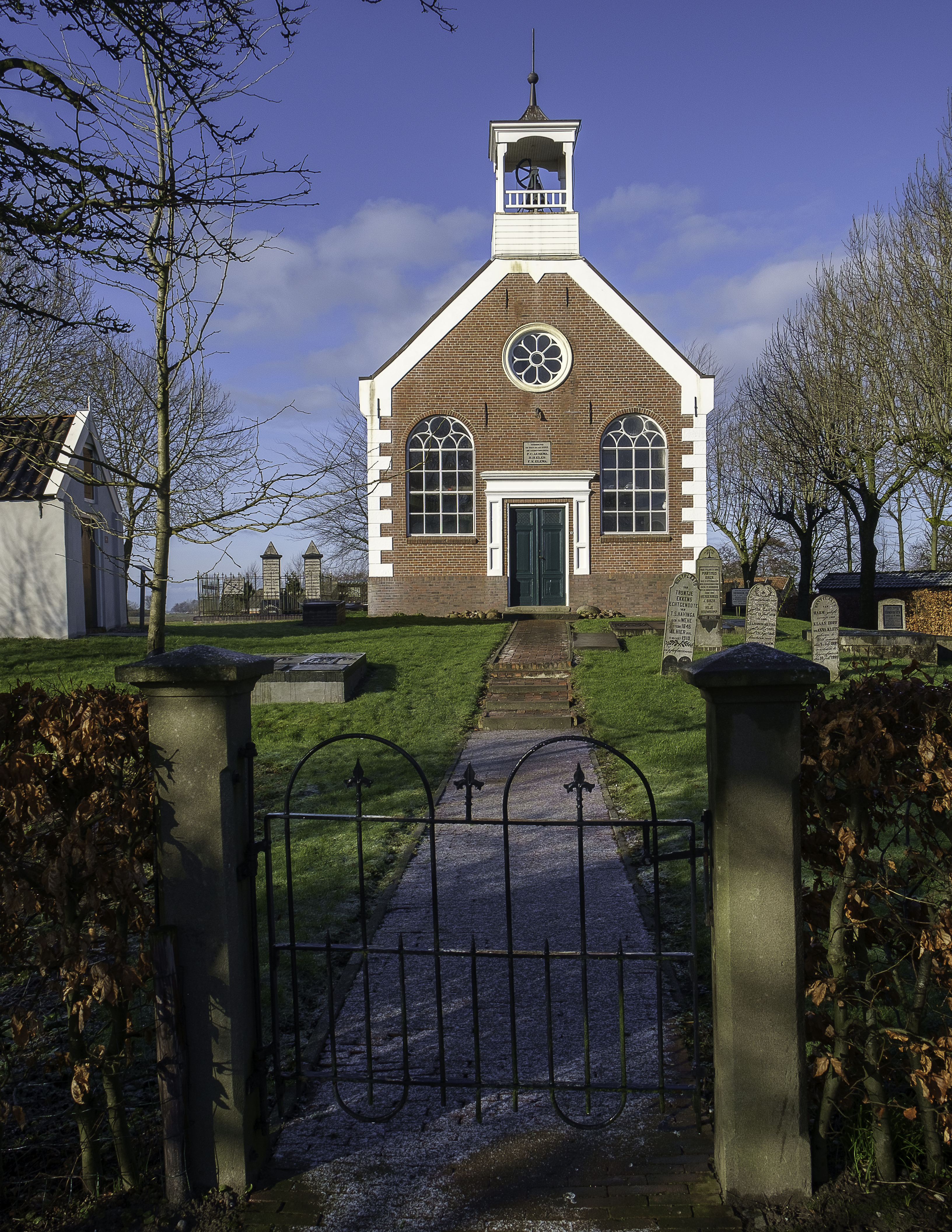 Kerk van Eppenhuizen: vooraanzicht